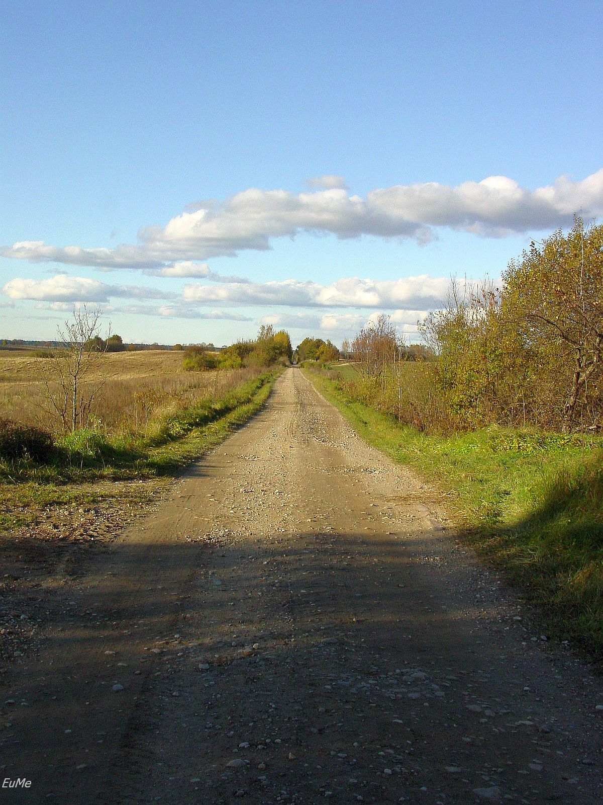 Nasyp kolejowy